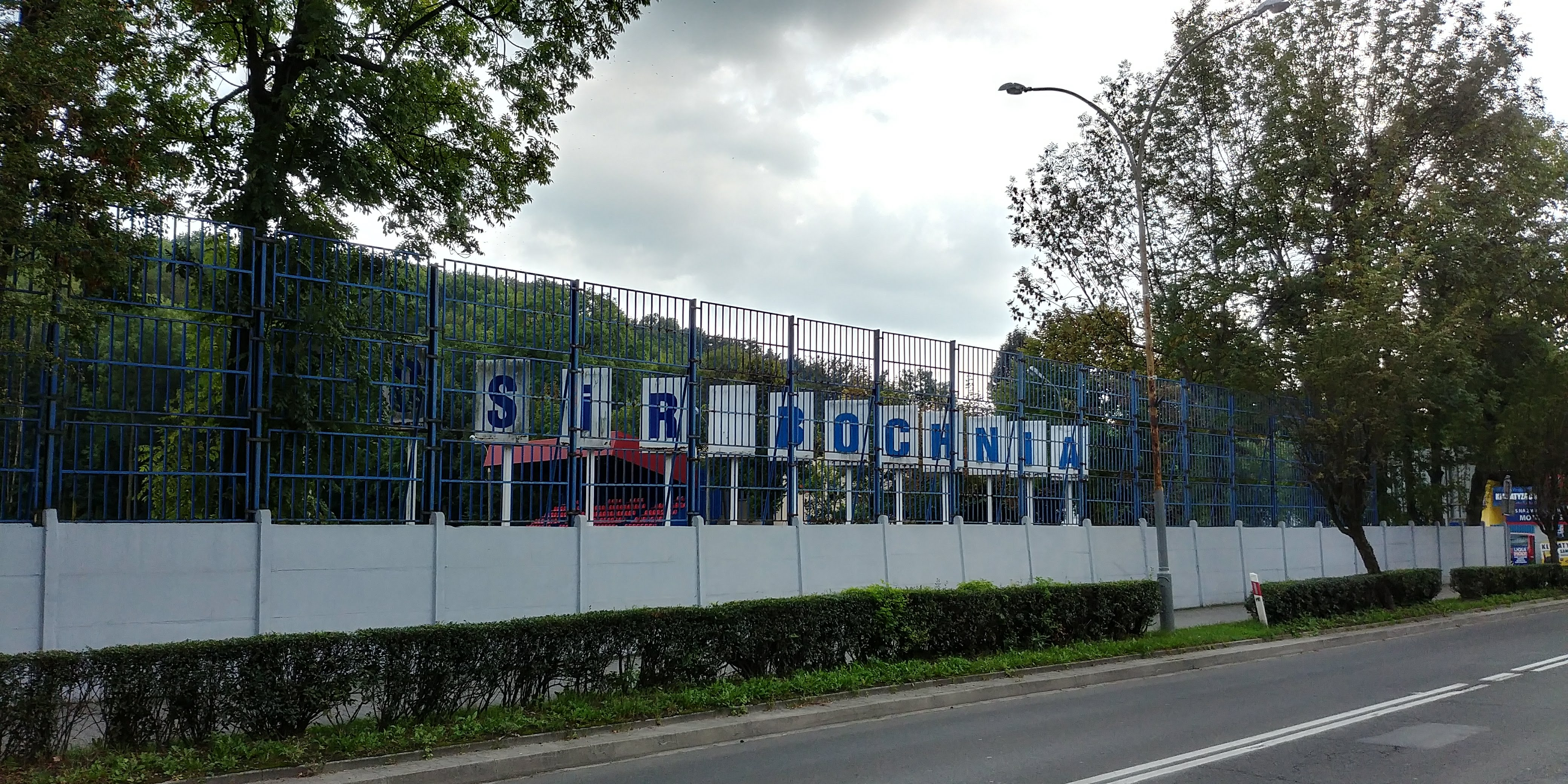 Stadion MOSiR w Bochni.